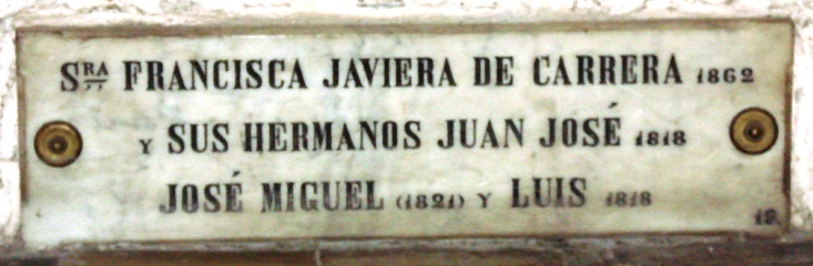 Vista de otra placa conmemorativa a los hemanos Carrera en la Catedral de Santiago de Chile.